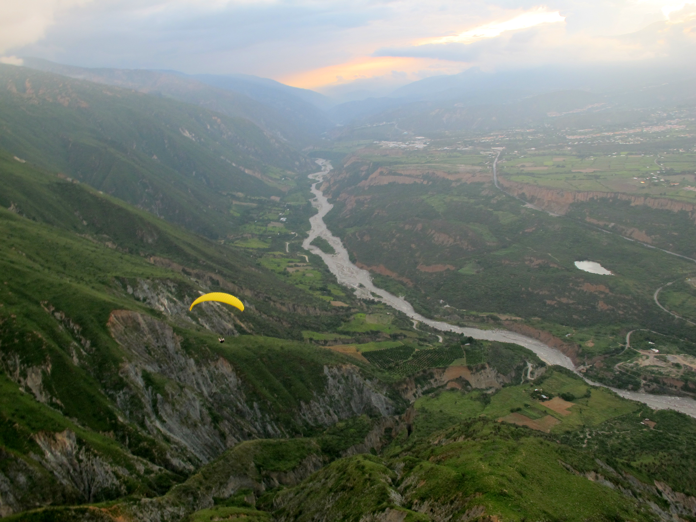 Paragliding over Chamaelva ved Mérida i Venezuela